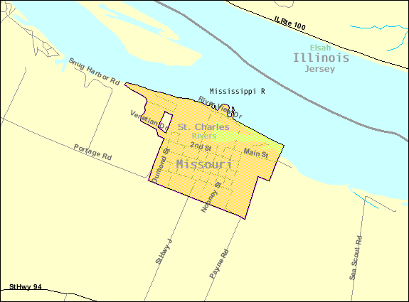 U.S. Census Map of Portage des Sioux, Missouri